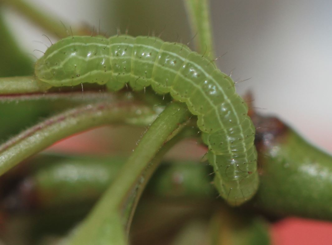 Jungraupe der Herbst-Rauhaareule (Asteroscopus sphinx) am 3. April 2019 in Walldorf/Baden